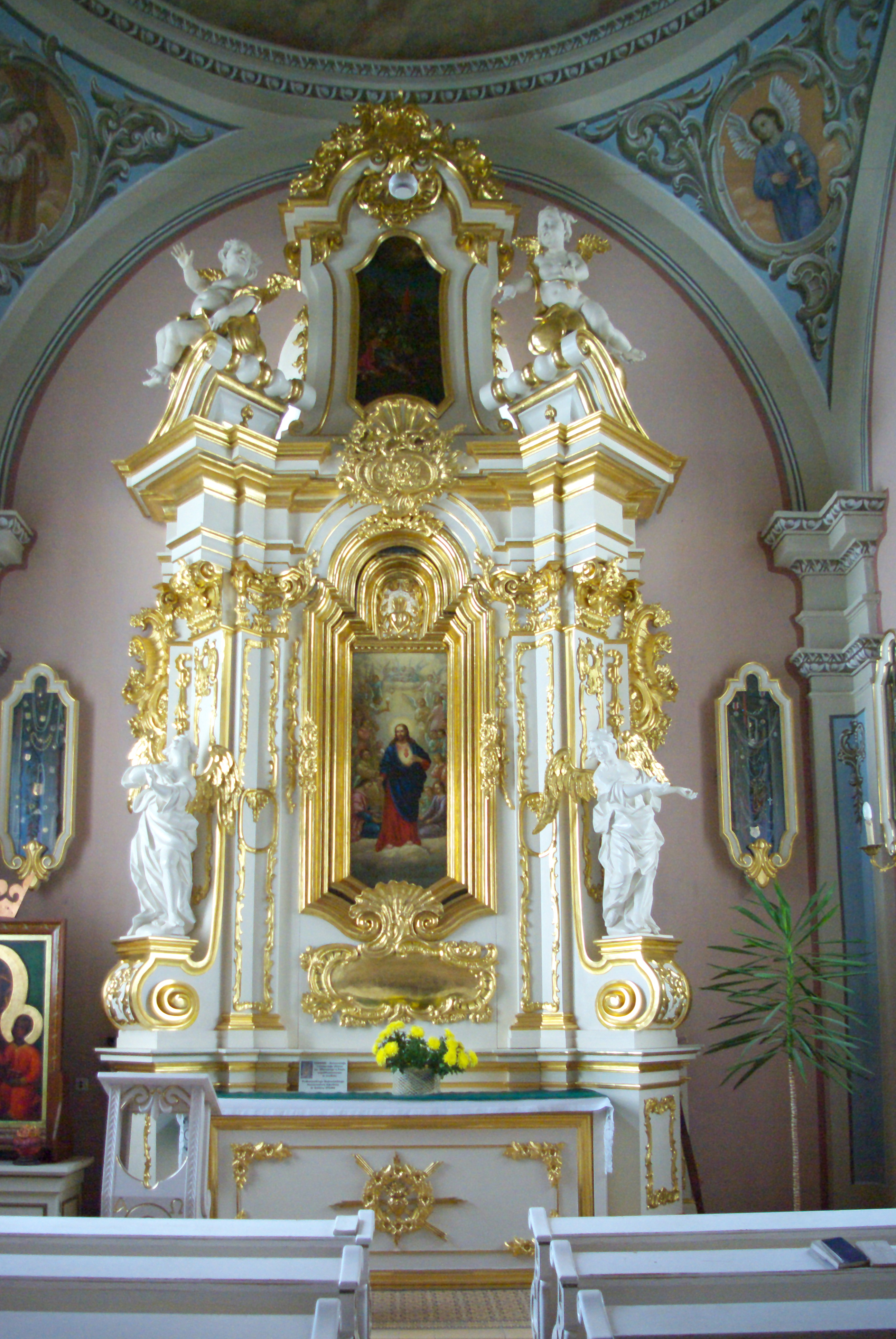 Ołtarz w kościele Przemienienia Pańskiego w Brzozowie.